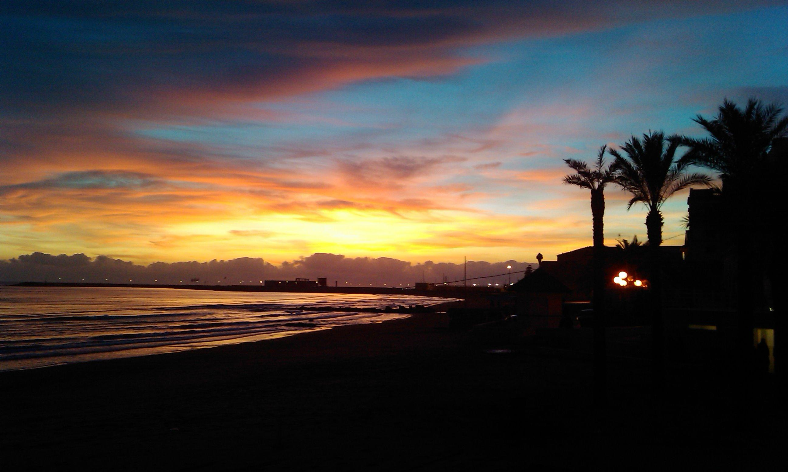 Foto di Marina di Ragusa